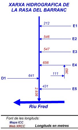 Mapa esquemàtic de la xarxa hidrogràfica de la Rasa del Barranc, afluent del Riu Fred, al municipi de Lladurs (Solsonès).